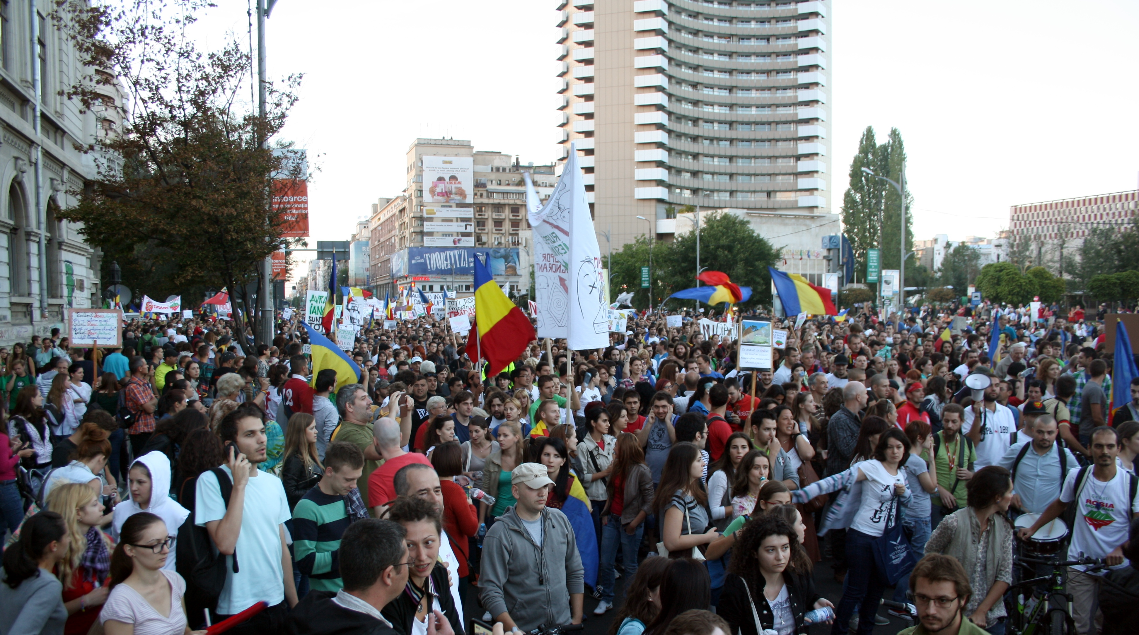 Protest 15 septembrie Piața Universității